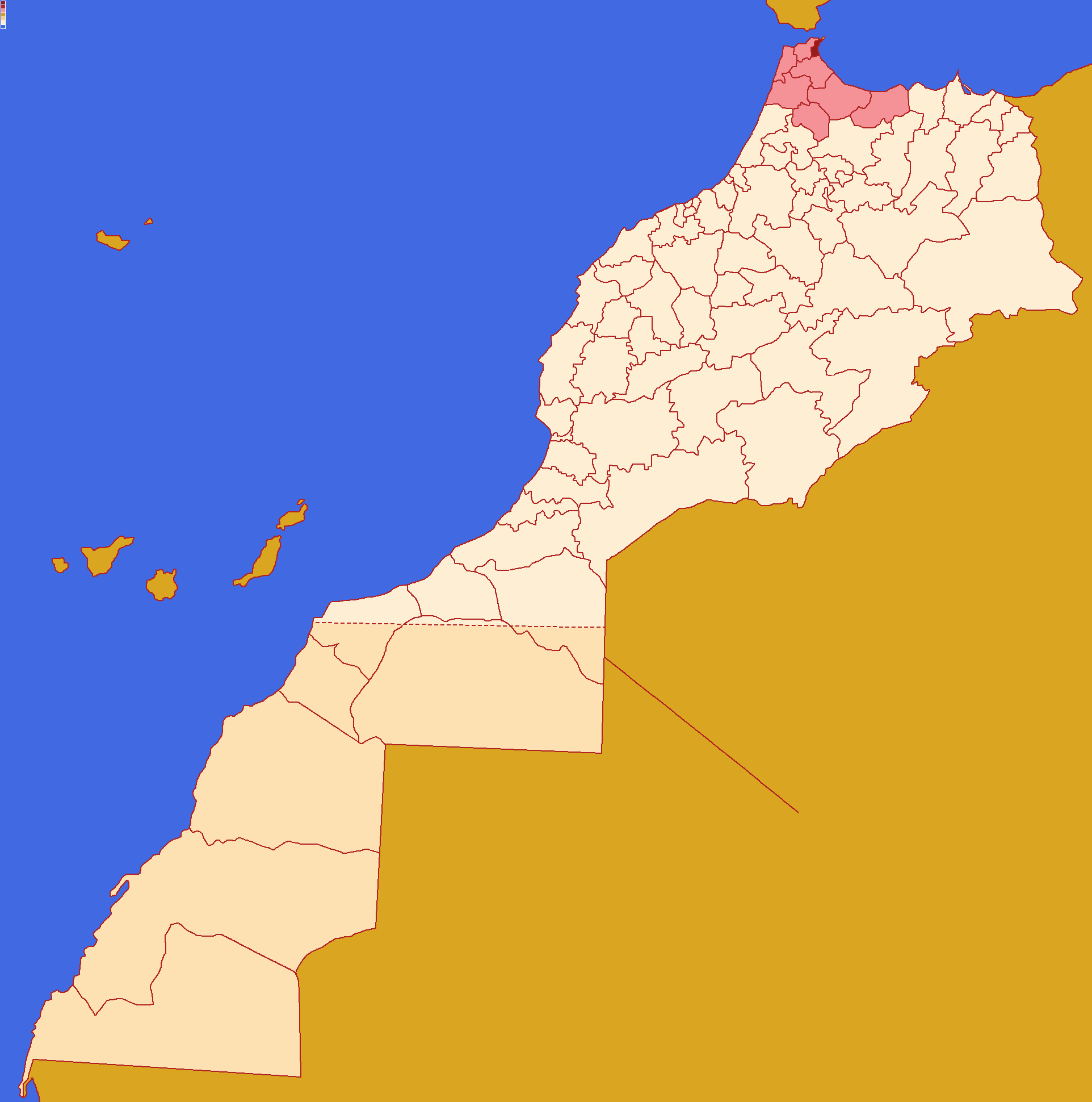 Localização da prefeitura de M'Diq-Fnideq dentro da região de Tânger-Tetuão-Al Hoceïma e dentro de Marrocos. Conforme a reforma administrativa de 2015.